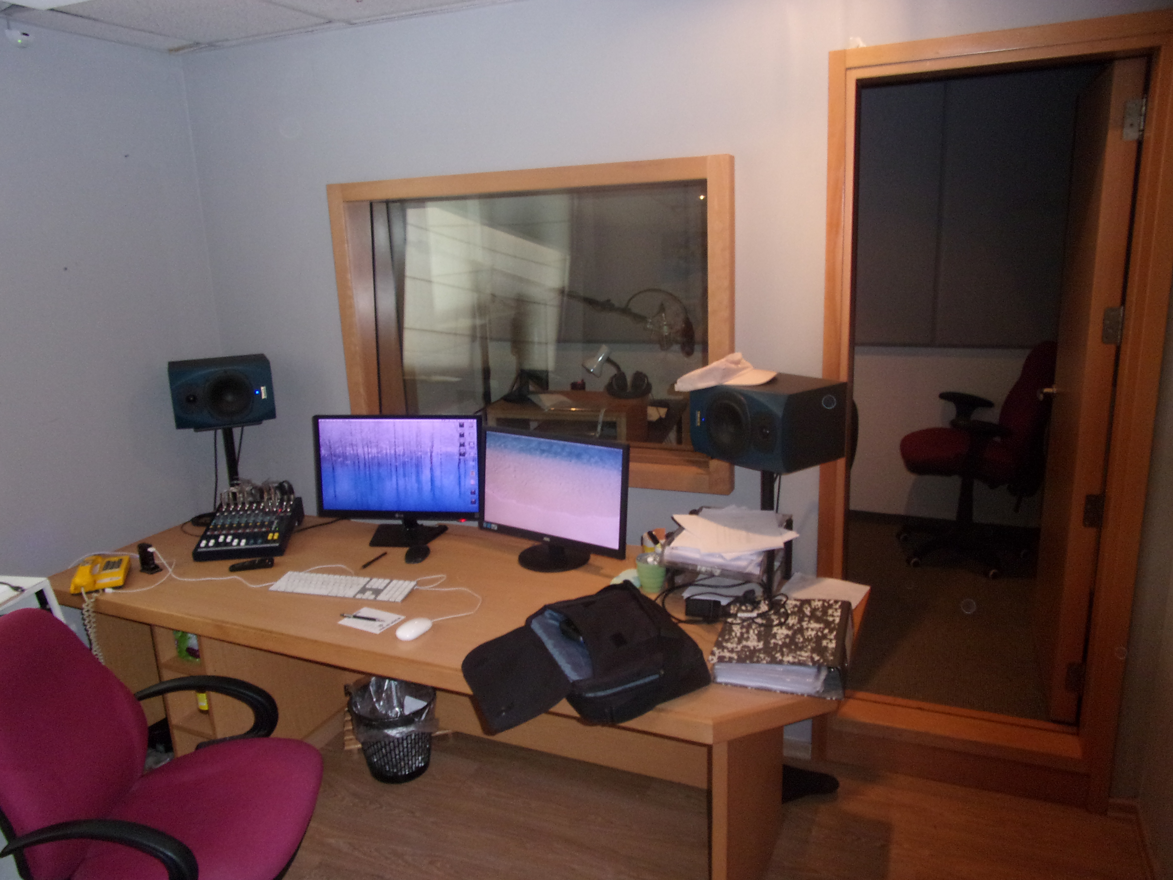 אולפן ההקלטות של הבמאים והמפיקים 2017